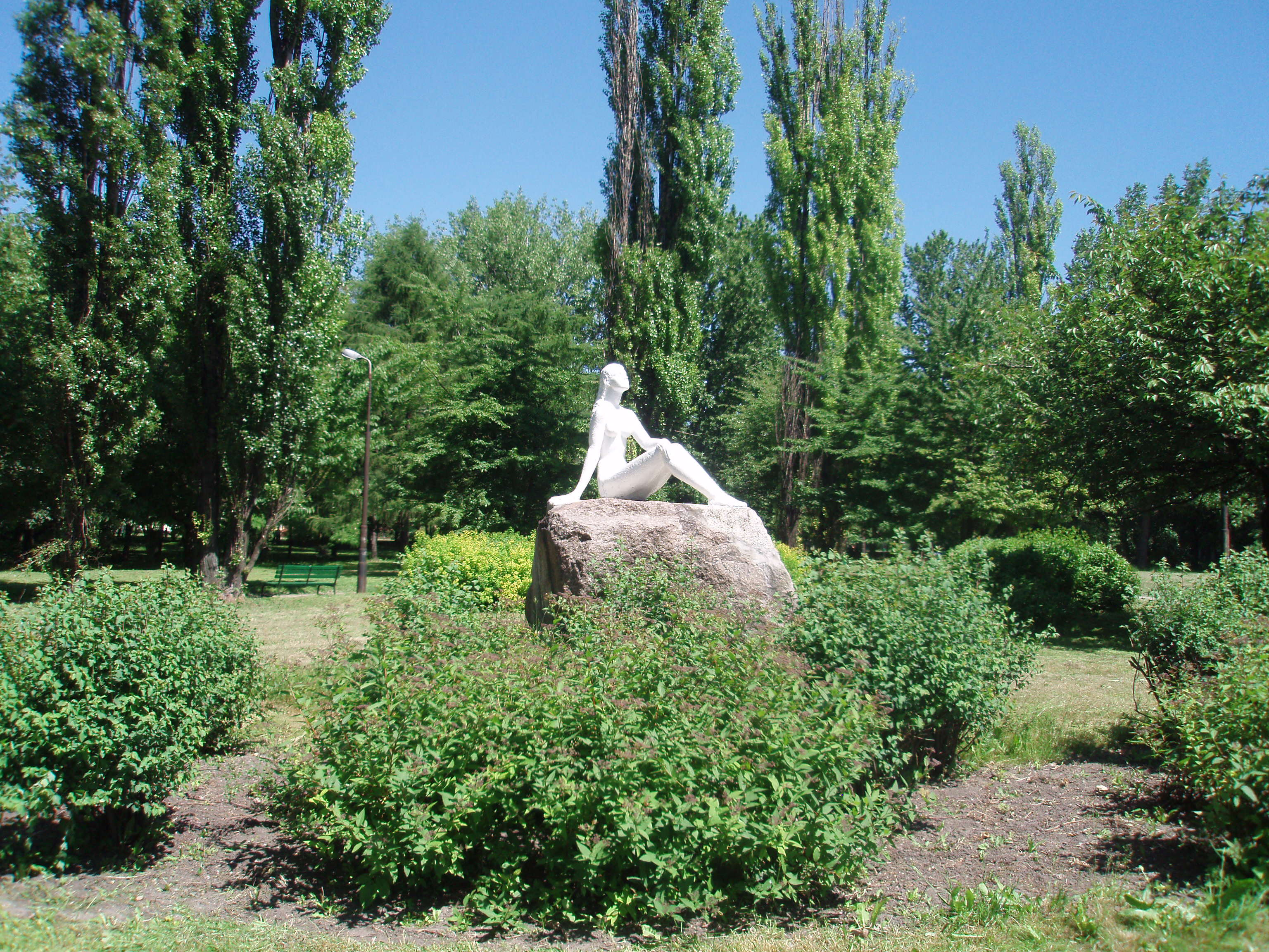 Skwer im. W Dubaniewicza (ekologa, urbanisty), widok na figurę od ul. Paderewskiego